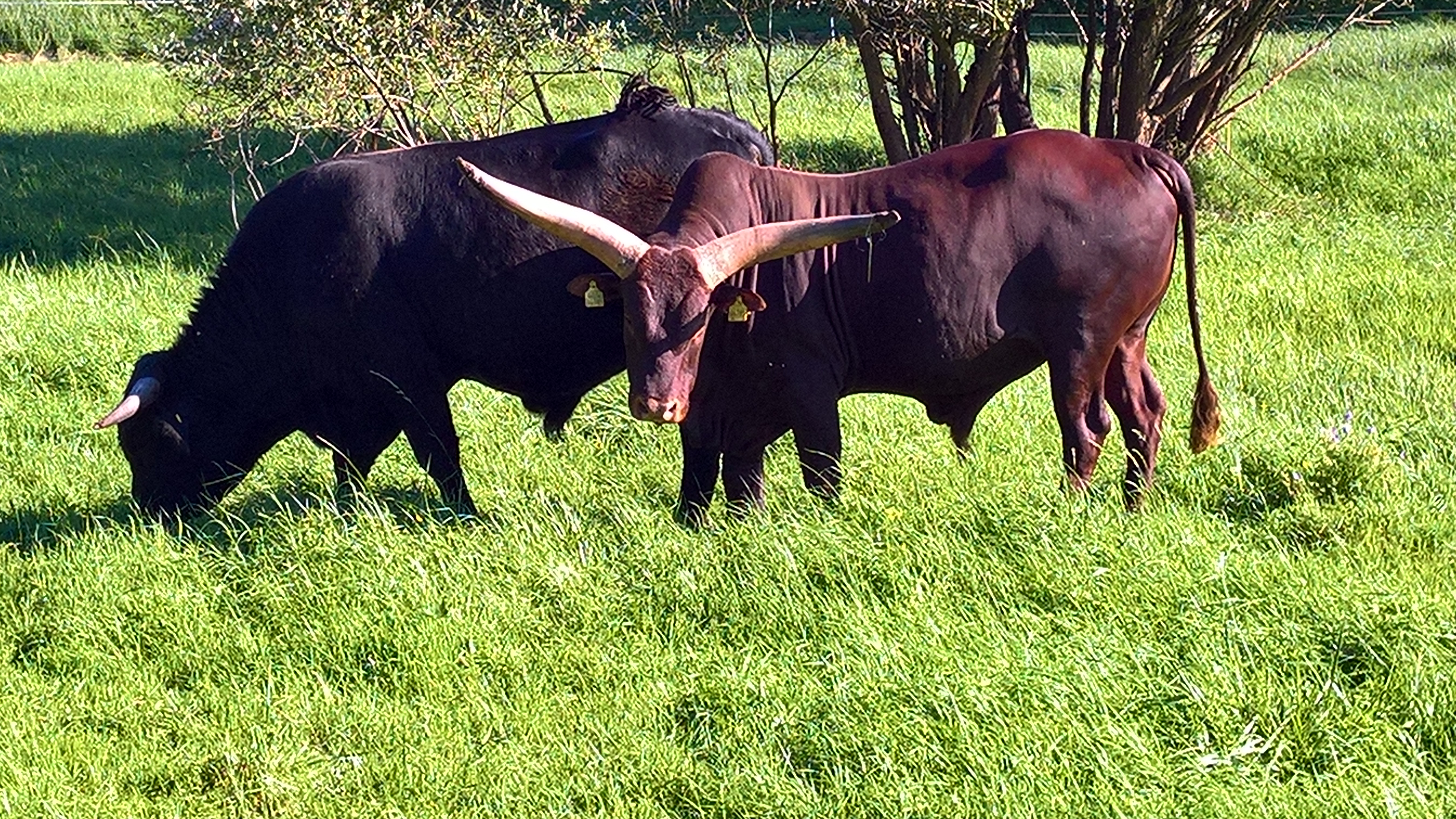 Rinder auf der Weide zwischen Kloster und Freilichtlabor Lauresham am Kulturweg, Sayaguesa-Jungbulle Takkie und Watussi-Tier Thando, „Mitarbeiter“ am Auerrindprojekt, Sommer 2017 auf den Wiesen am Kulturweg zwischen Kloster Lorsch und dem Freilichtlabor Lauresham